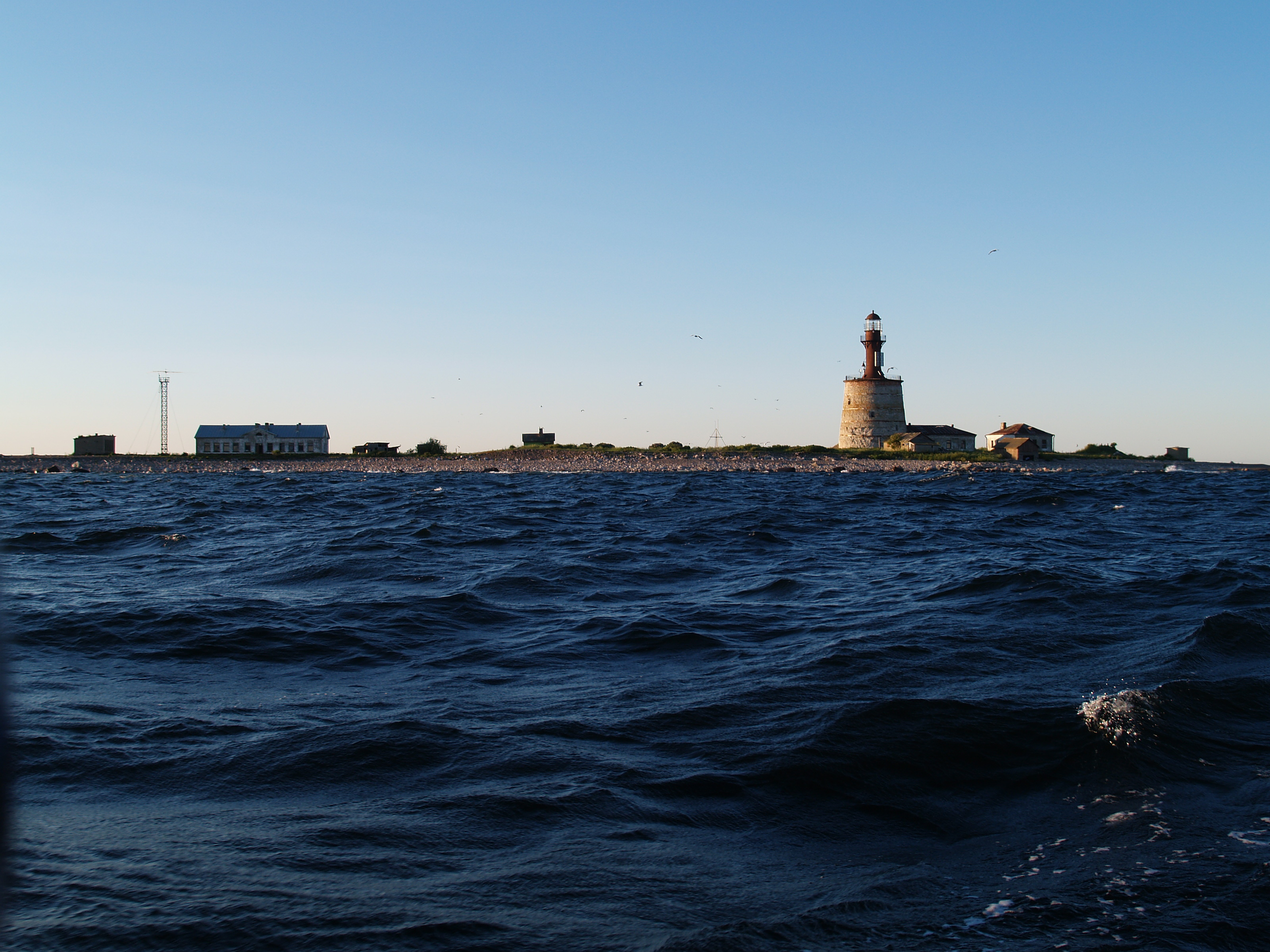 Keri saar